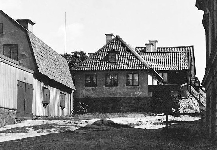 Katarina Östra Kvarngränd 7 österut. Nuv. Sandbacksgatan 7, kv. Sandbacken Mindre och Glasbrukstäppan